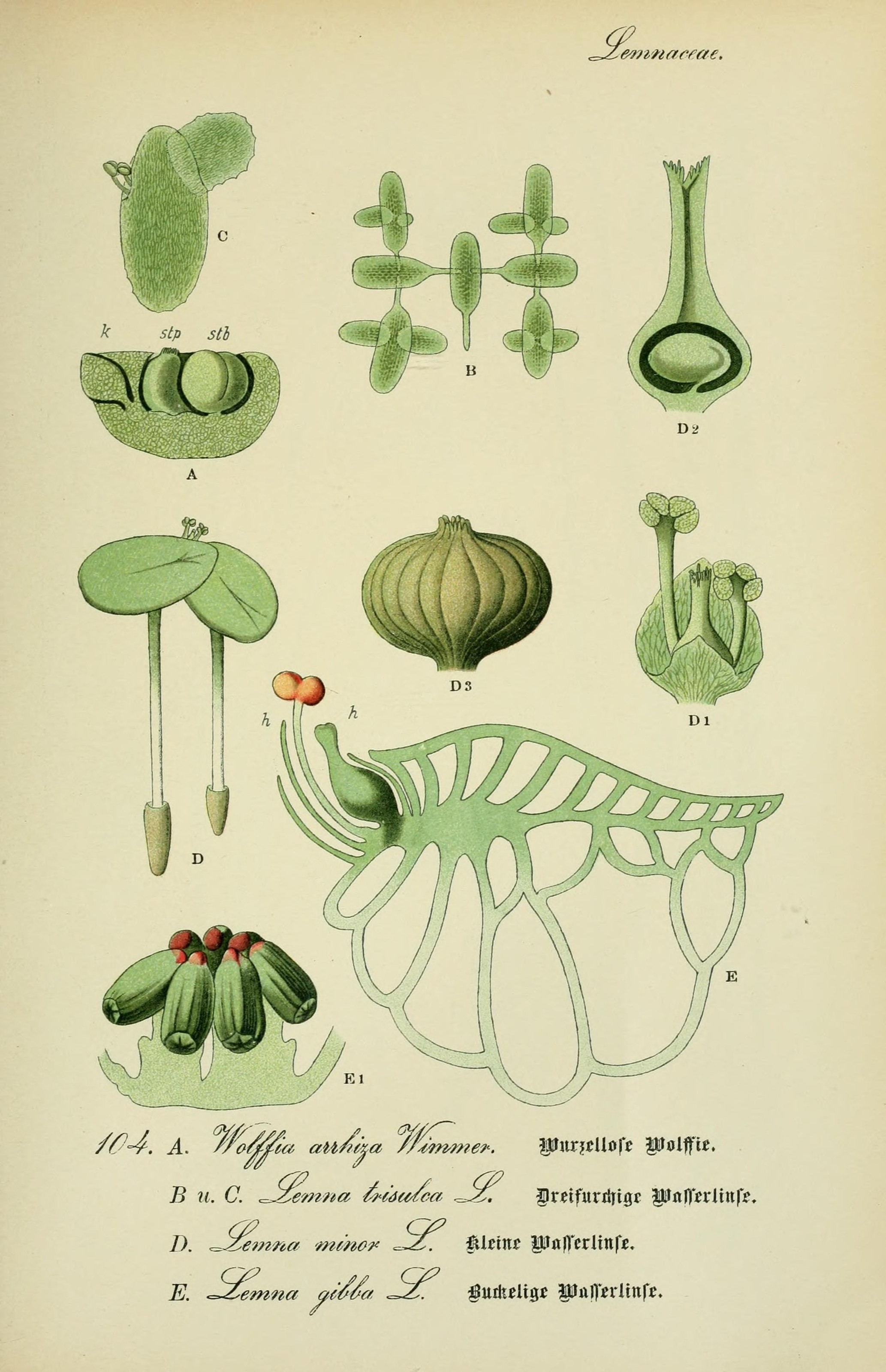 Jz^&mi &mnaryae.